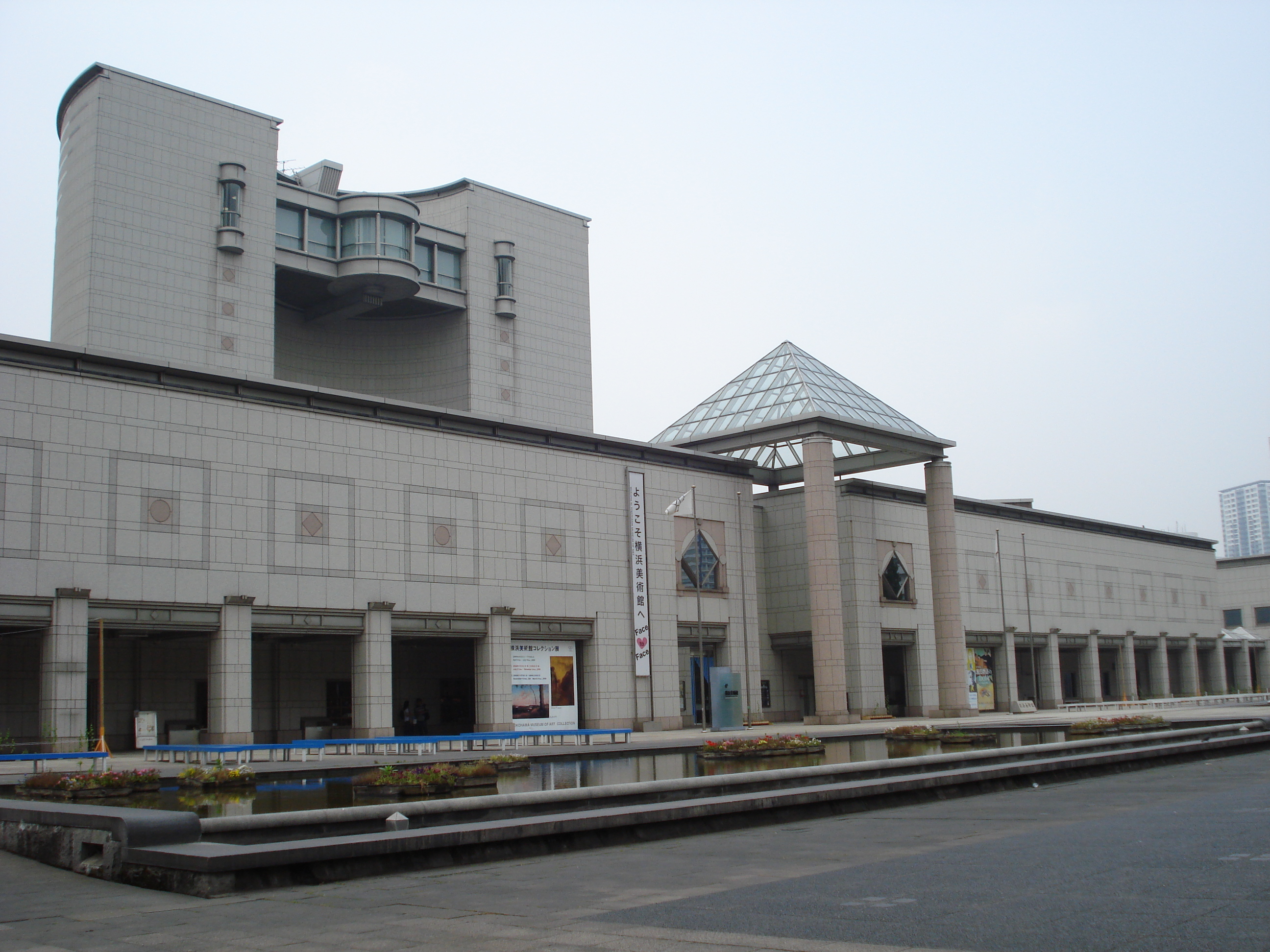 yokohama museum of art